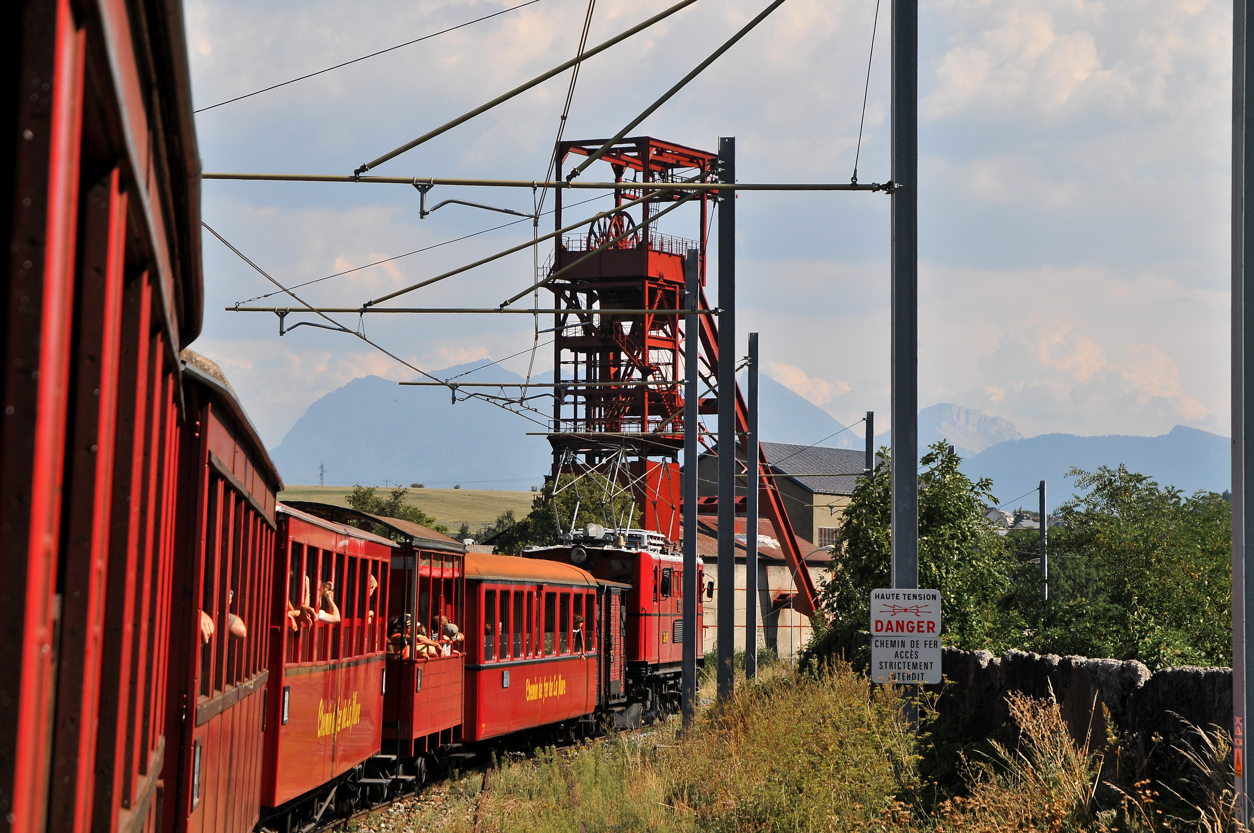 Chemin de Fer de La Mure